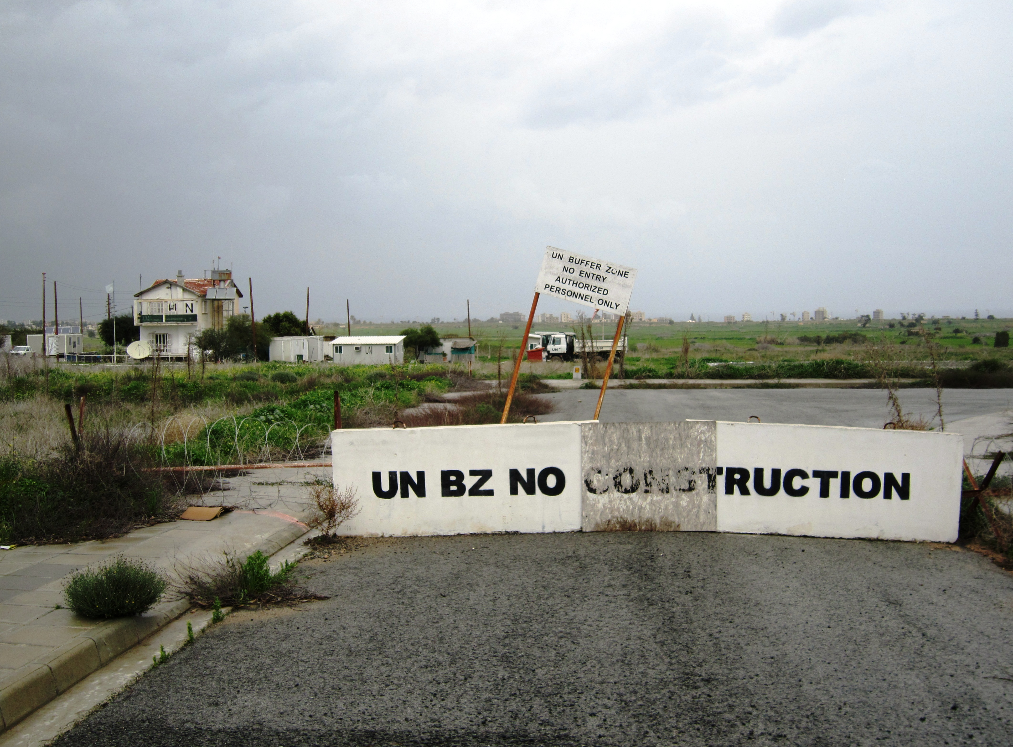 Buffer zone